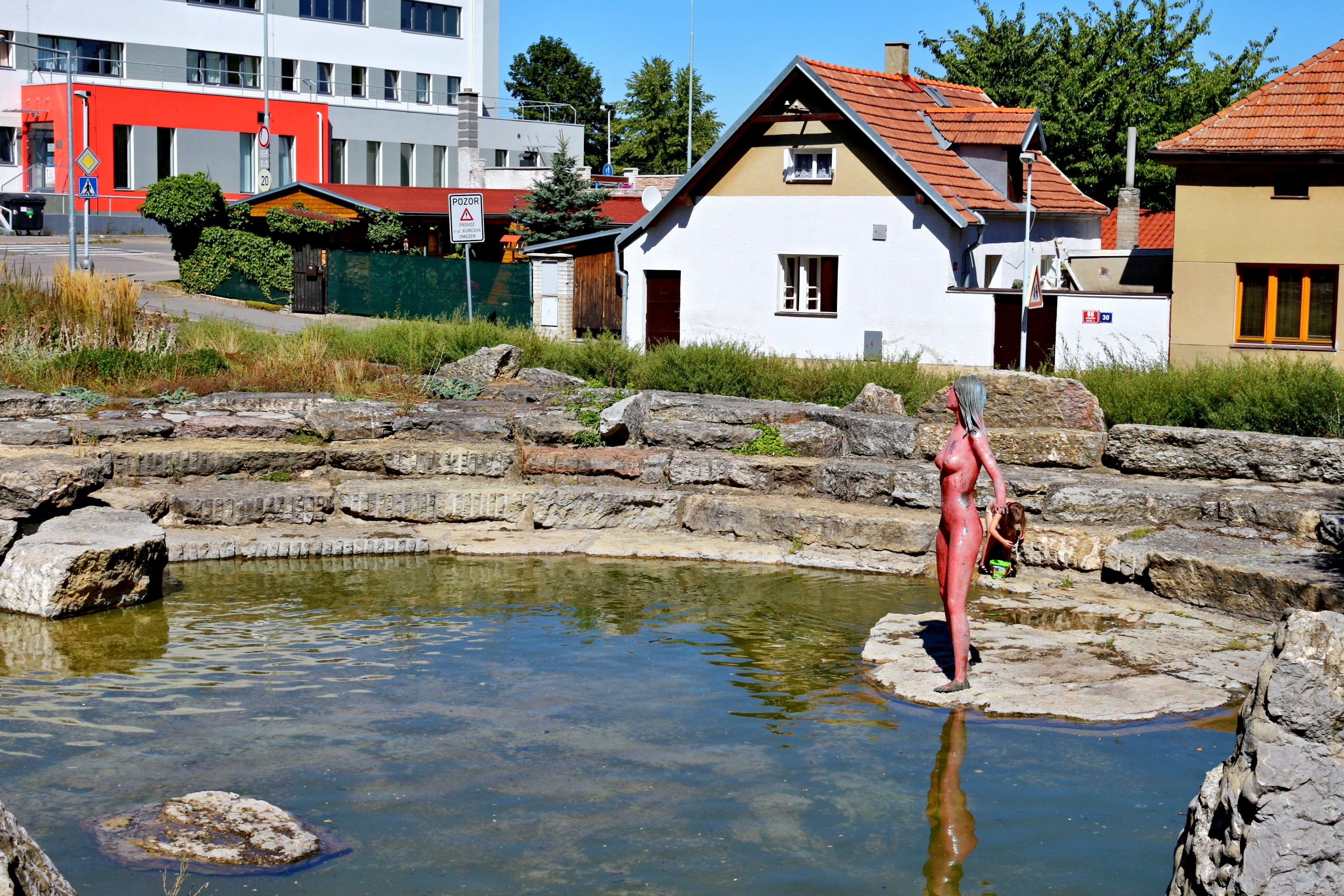 Staré Stodůlky